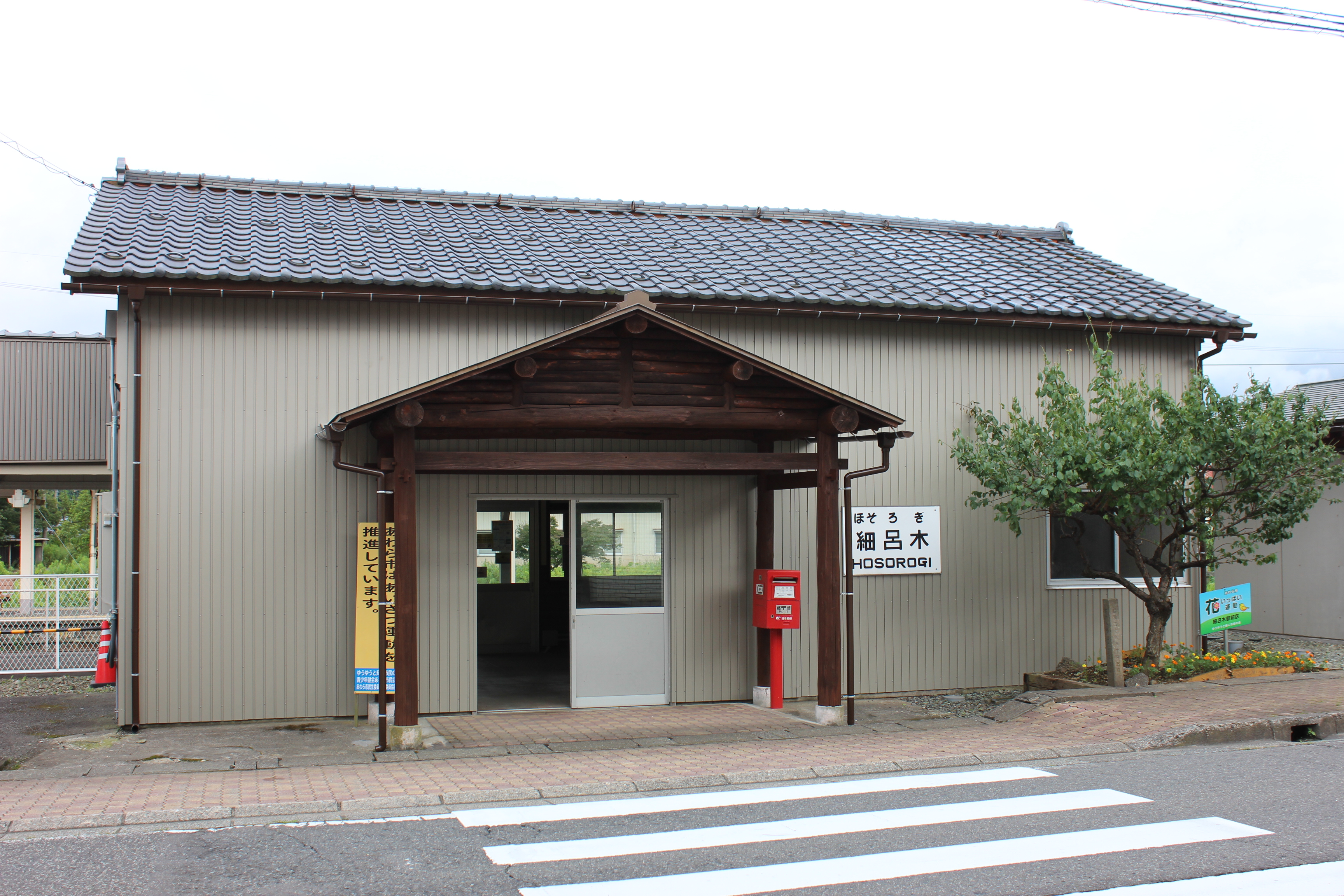 細呂木駅（福井県あわら市）